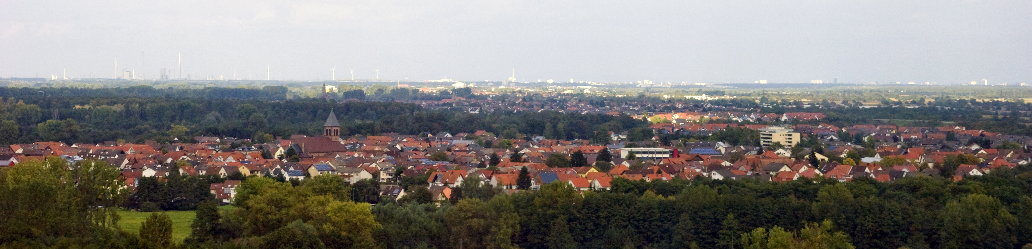 Ein Luftbild der Gemeinde Ötigheim.